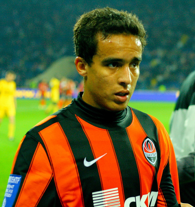 25/09/2010, Металлист - Шахтер - 1:2 Жадсон и человек-улыбака